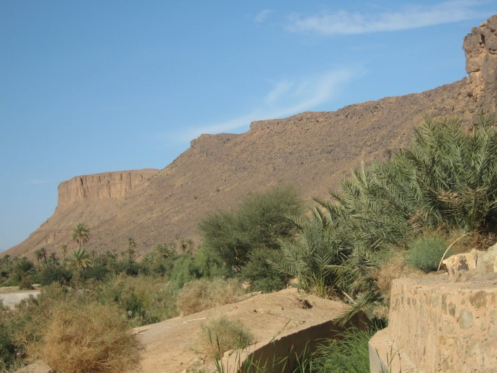 Tazarine di giorno